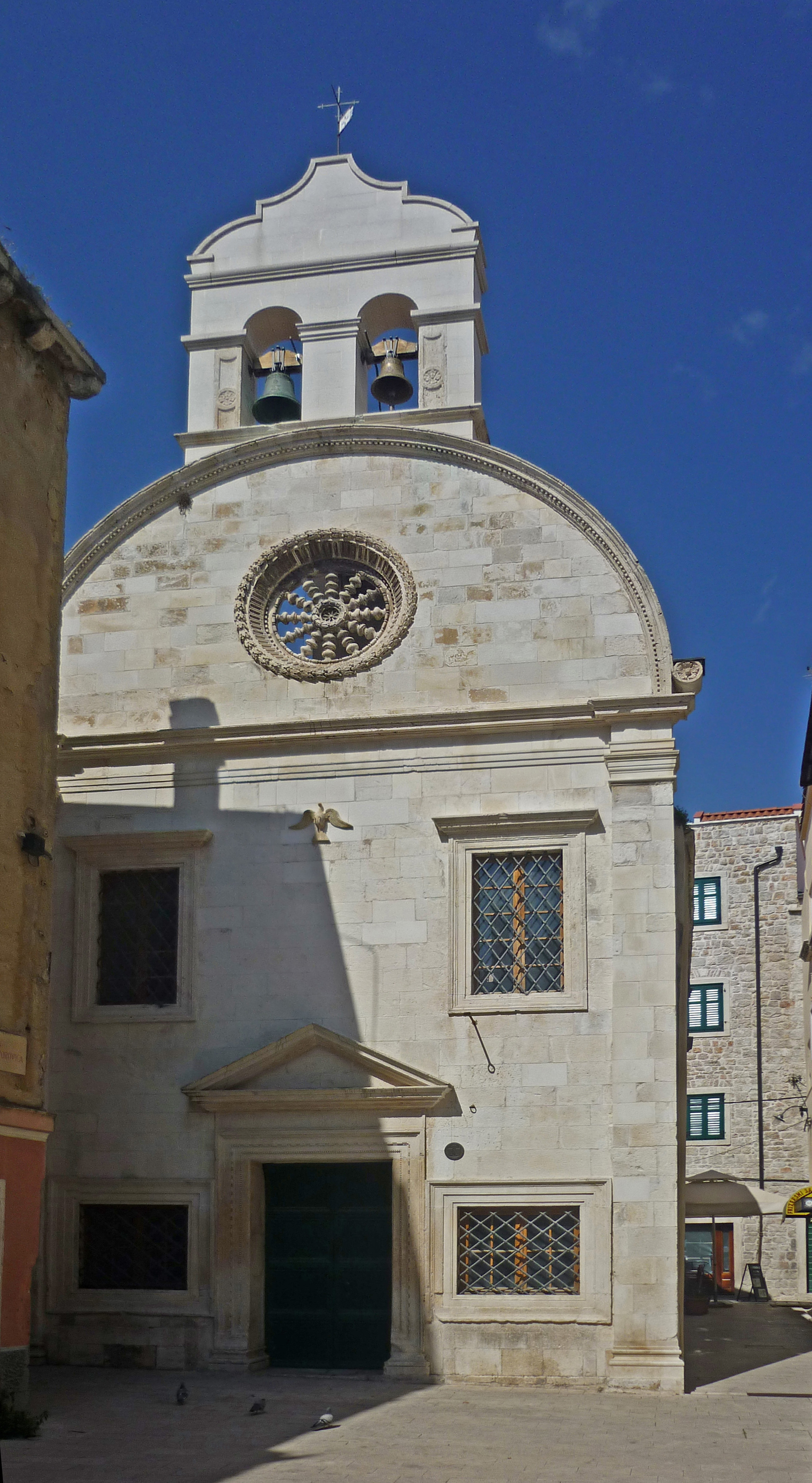 Heiliggeistkirche in Šibenik (dt.: Sibenning, ital.: Sebenico)